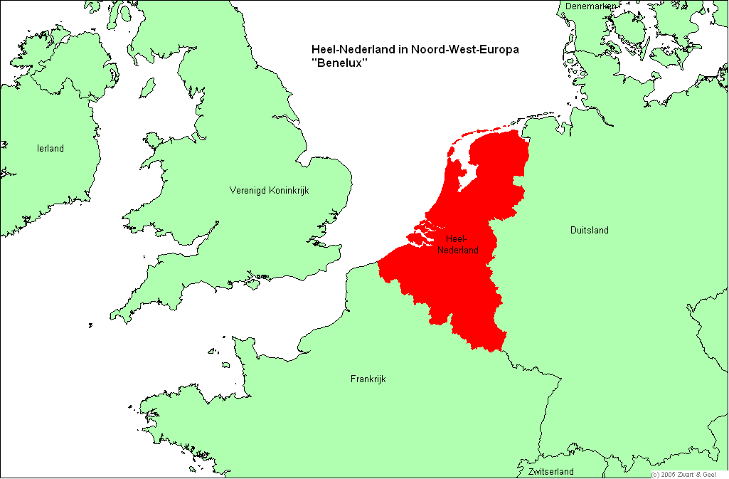 Heel-Nederland in Europa